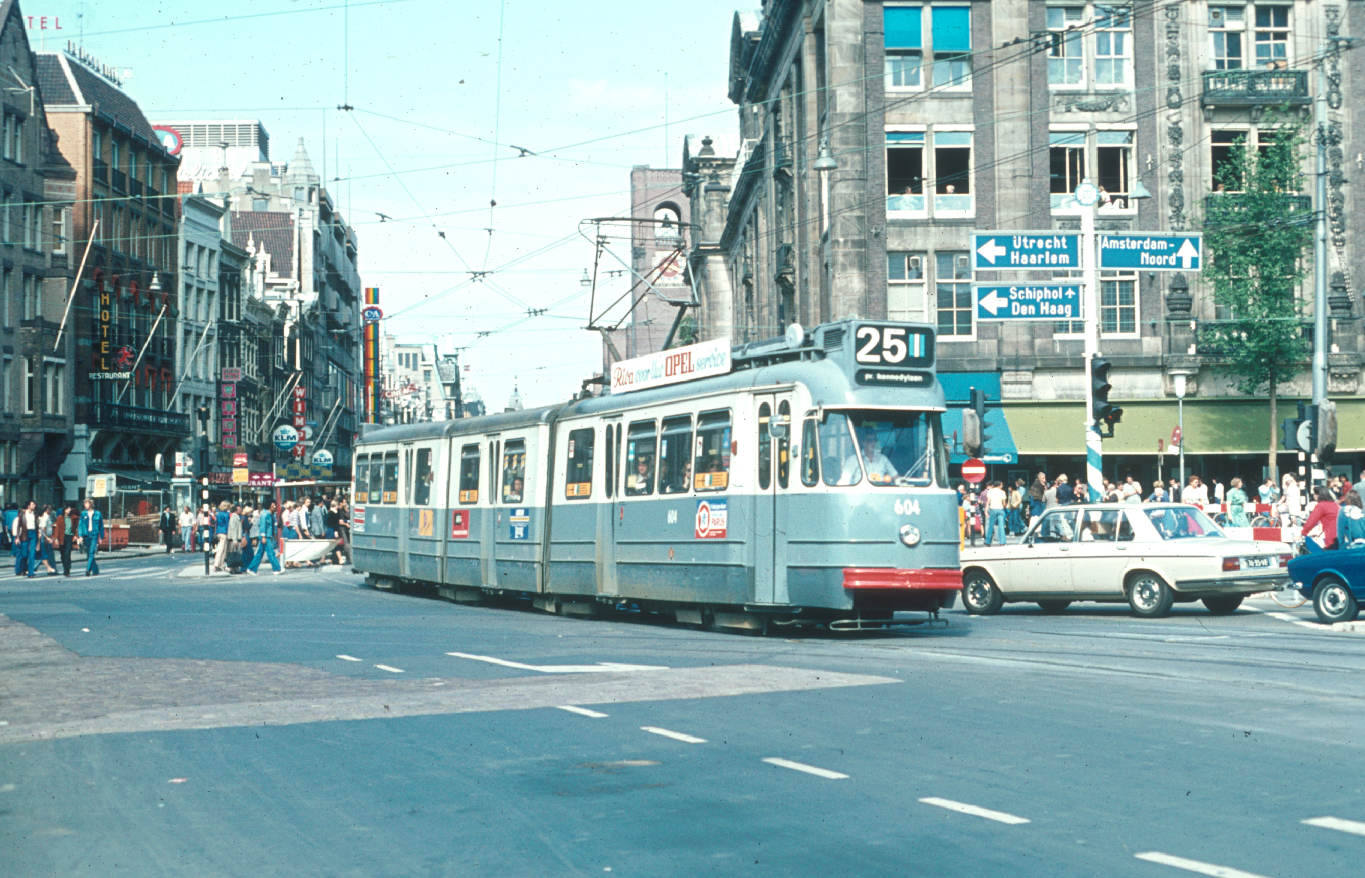 Gemeentevervoerbedrijf Amsterdam (GVB), Beijnes tram type 3G nr: 604 te Amsterdam